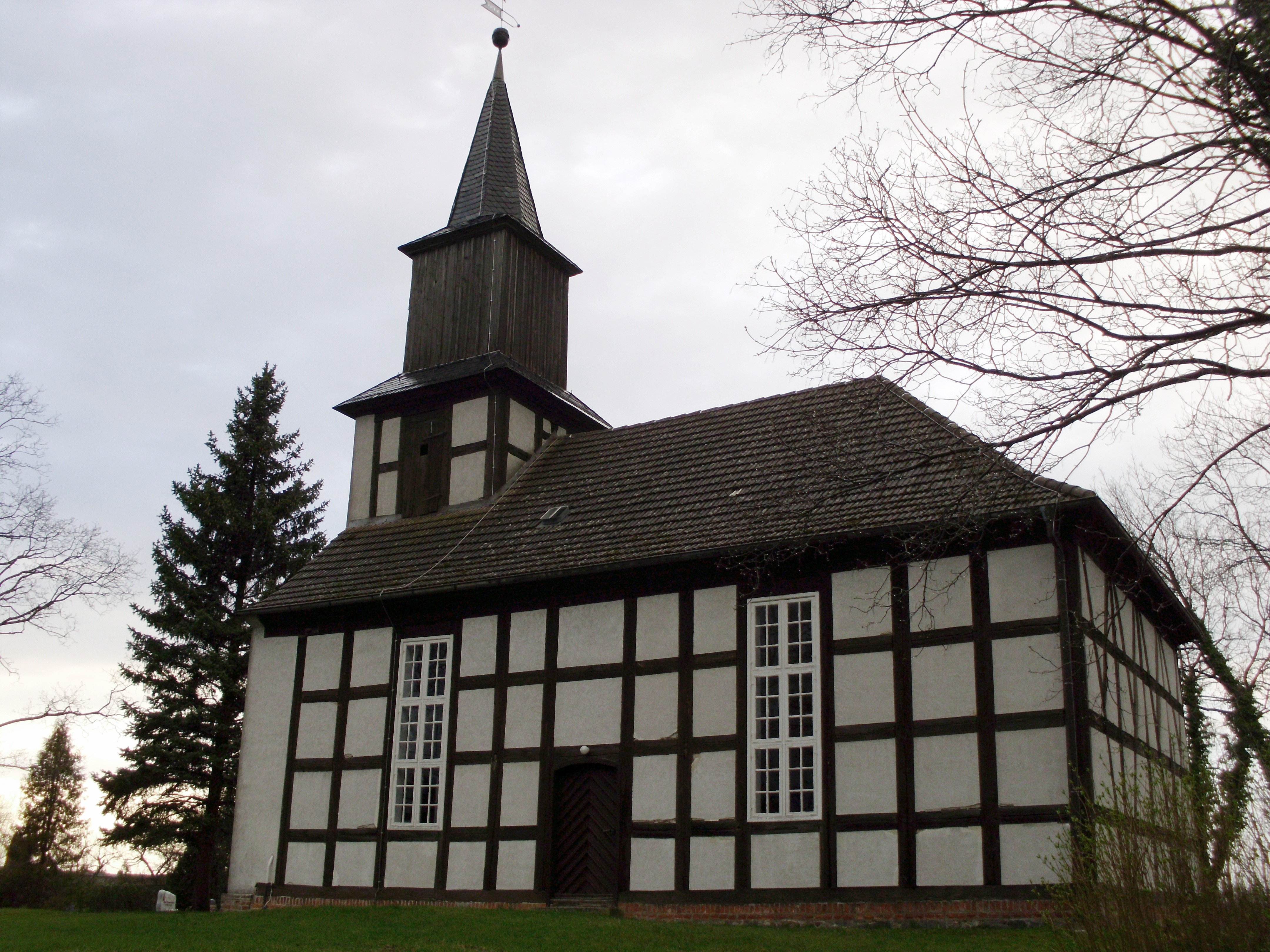 Kirche Braunsberg, Ortsteil von Rheinsberg, Brandenburg